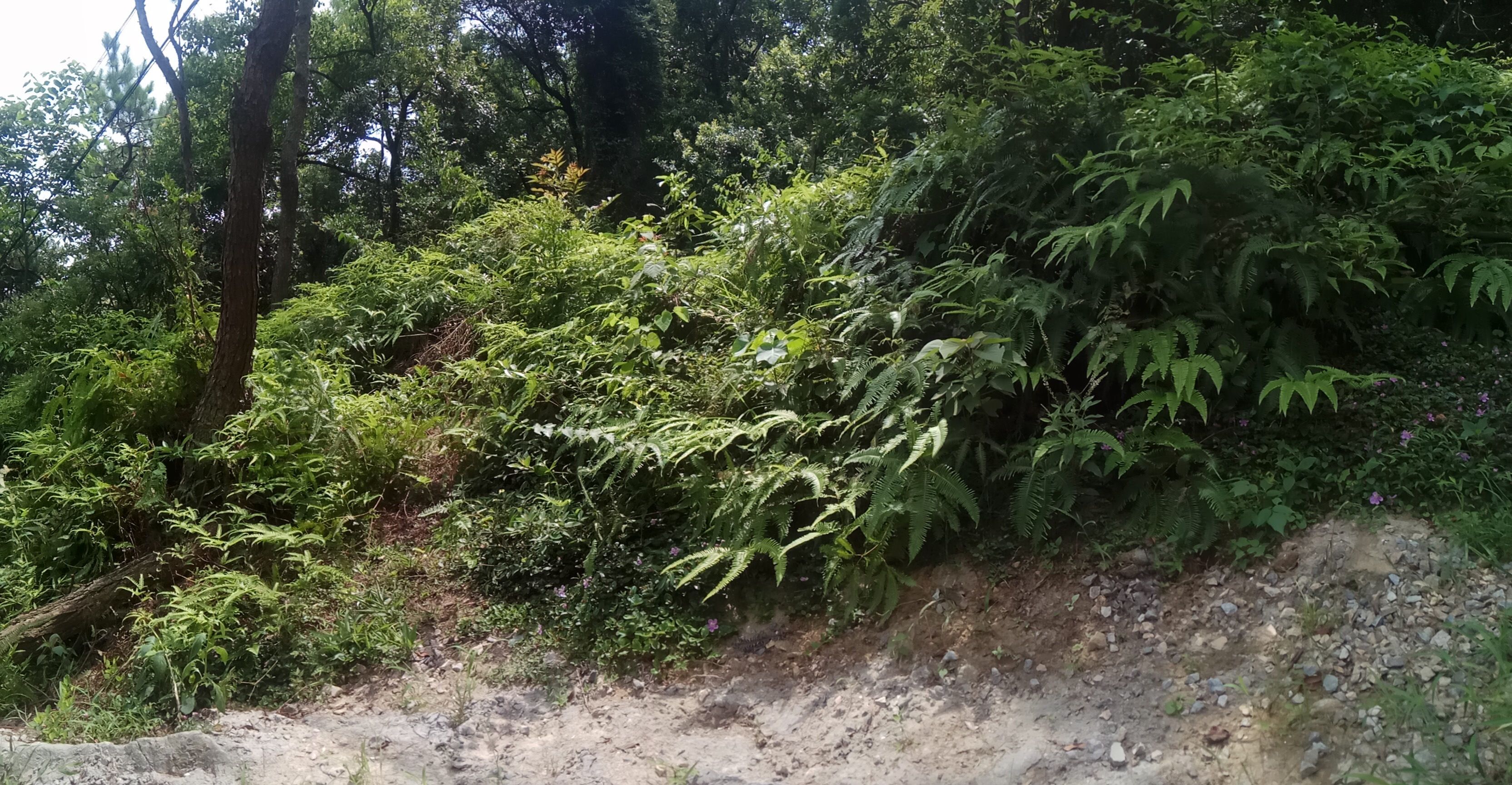 中文（中国大陆）: 草丛中的《圣训诗》石刻（我是真的找不到文物本身了，爬了半天山连文保碑都看不到）